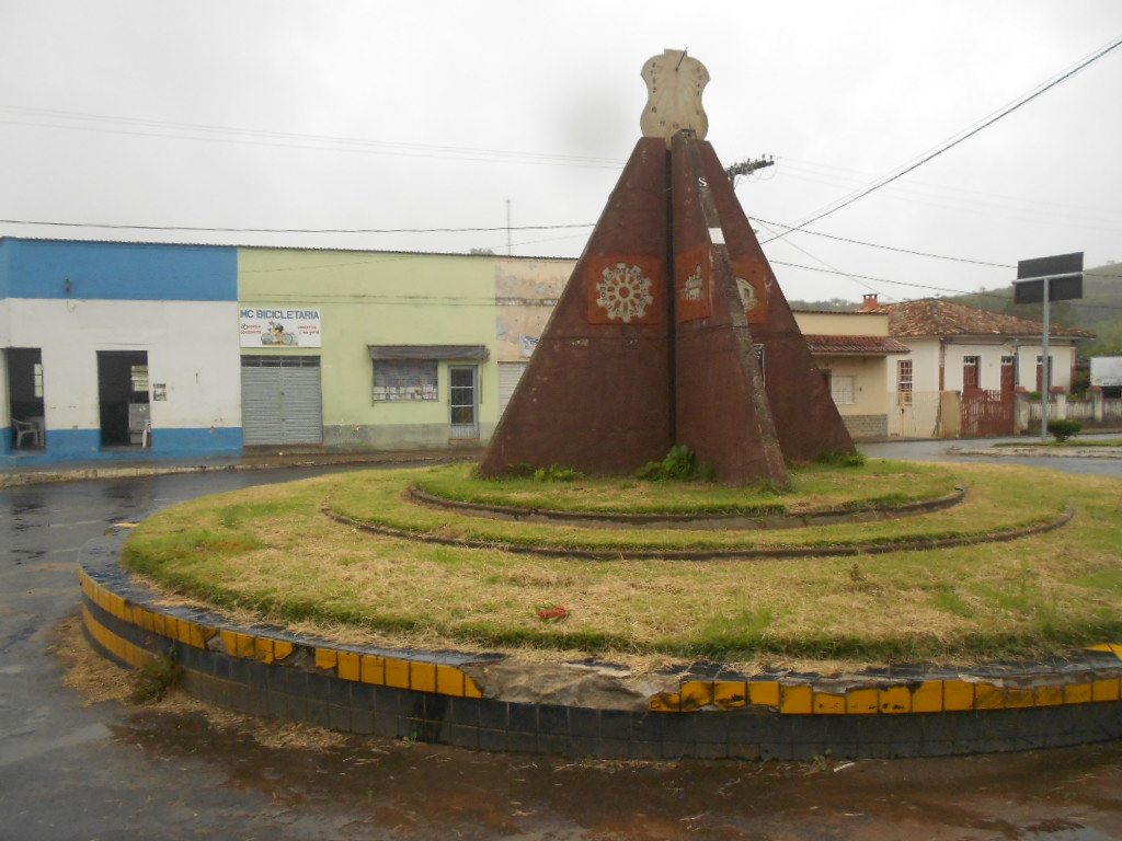 Rotatória em Bom Jardim de Minas, Minas Gerais, Brasil.